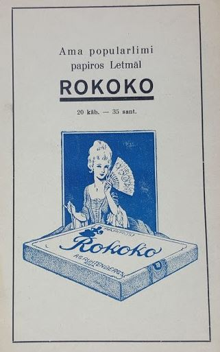 Liivikeelne paberossireklaam ajast enne Teist maailmasõda: "Kõige populaarsem pabeross Lätis: Rokoko. 20 tk – 35 santiimi."